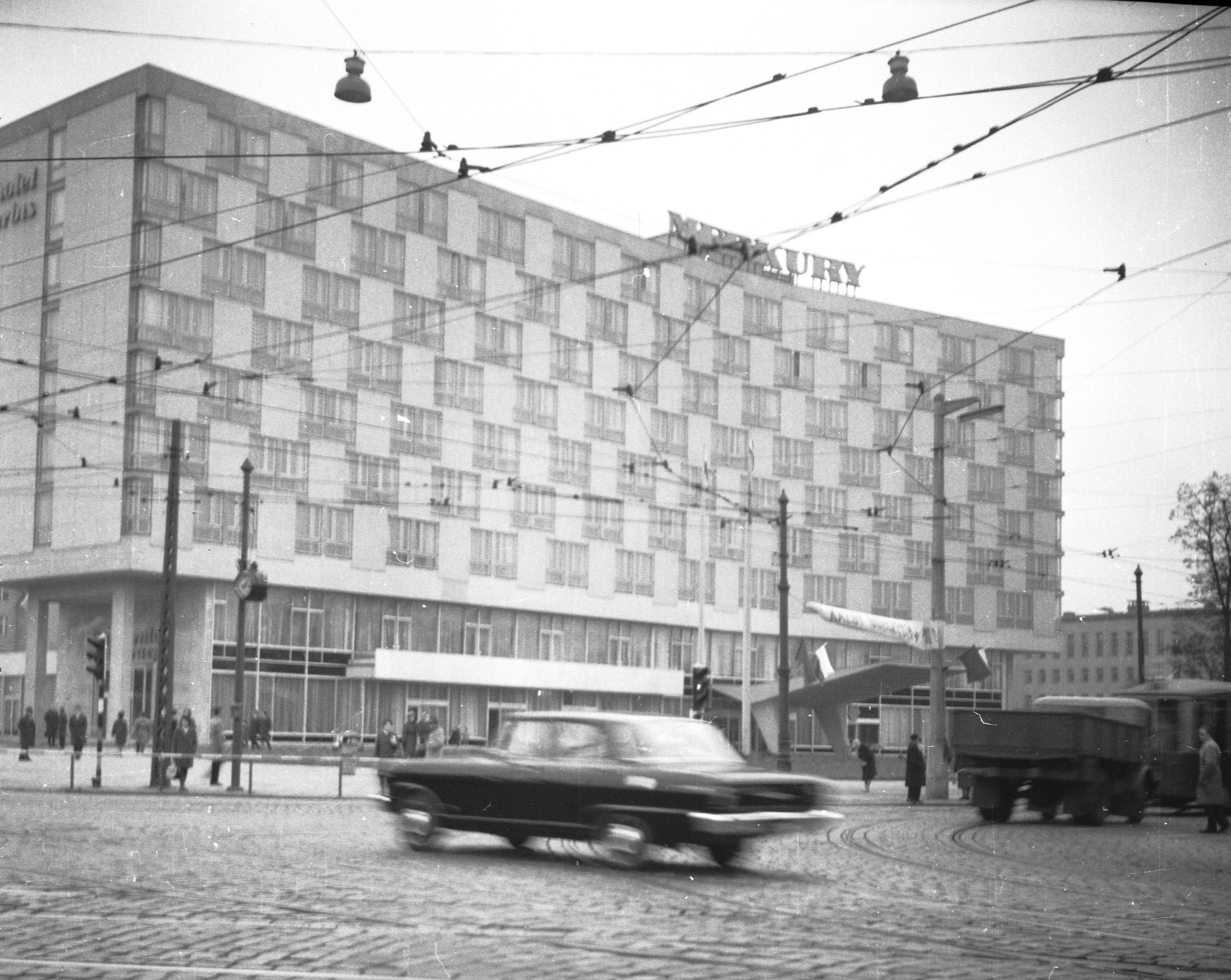 Widok na ówczesny Hotel Merkury od Mostu Dworcowego, 1964 rok.